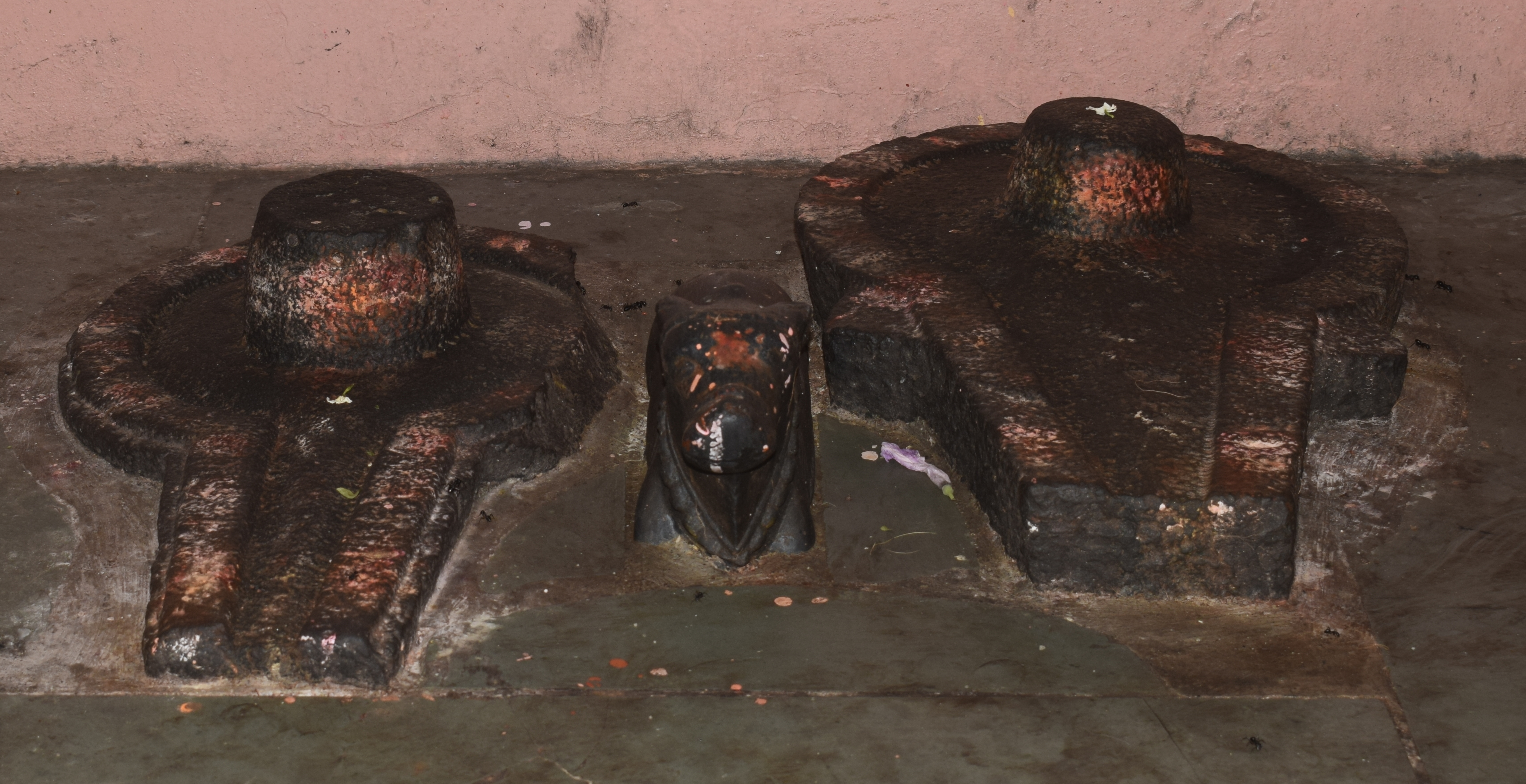 श्री जगेश्वर लिंग